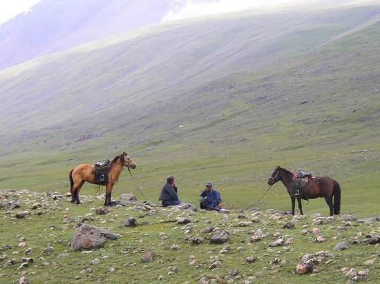 Twee herders in West Mongolië praten onder het genot van een sigaret bij